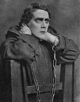 Anders de Wahl (1869-1956), foto av Henry B Goodwin fr�n 1919, upphovsrätten gick ut 2001. 10 juni 2003 kl.18.52 Den fjättrade ankan 283x358 (19684 bytes) (Anders de Wahl, foto av Henry B Goodwin från 1919, upphovsrätten gick ut 2001.)